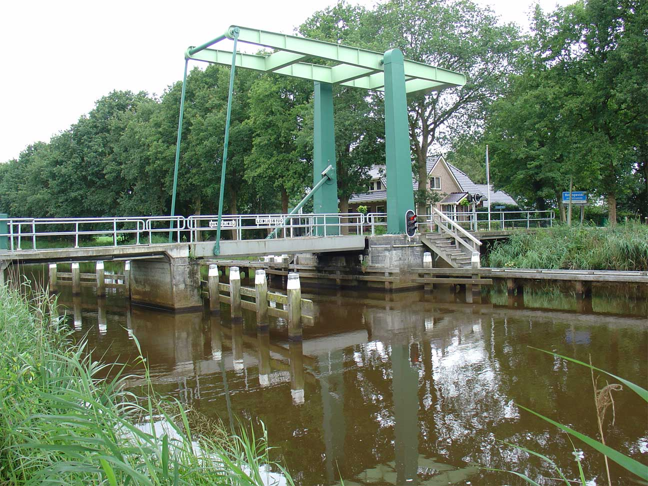 Leidijksbrug over het B.L. Tijdenskanaal